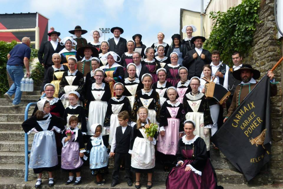 Bagadans 2015